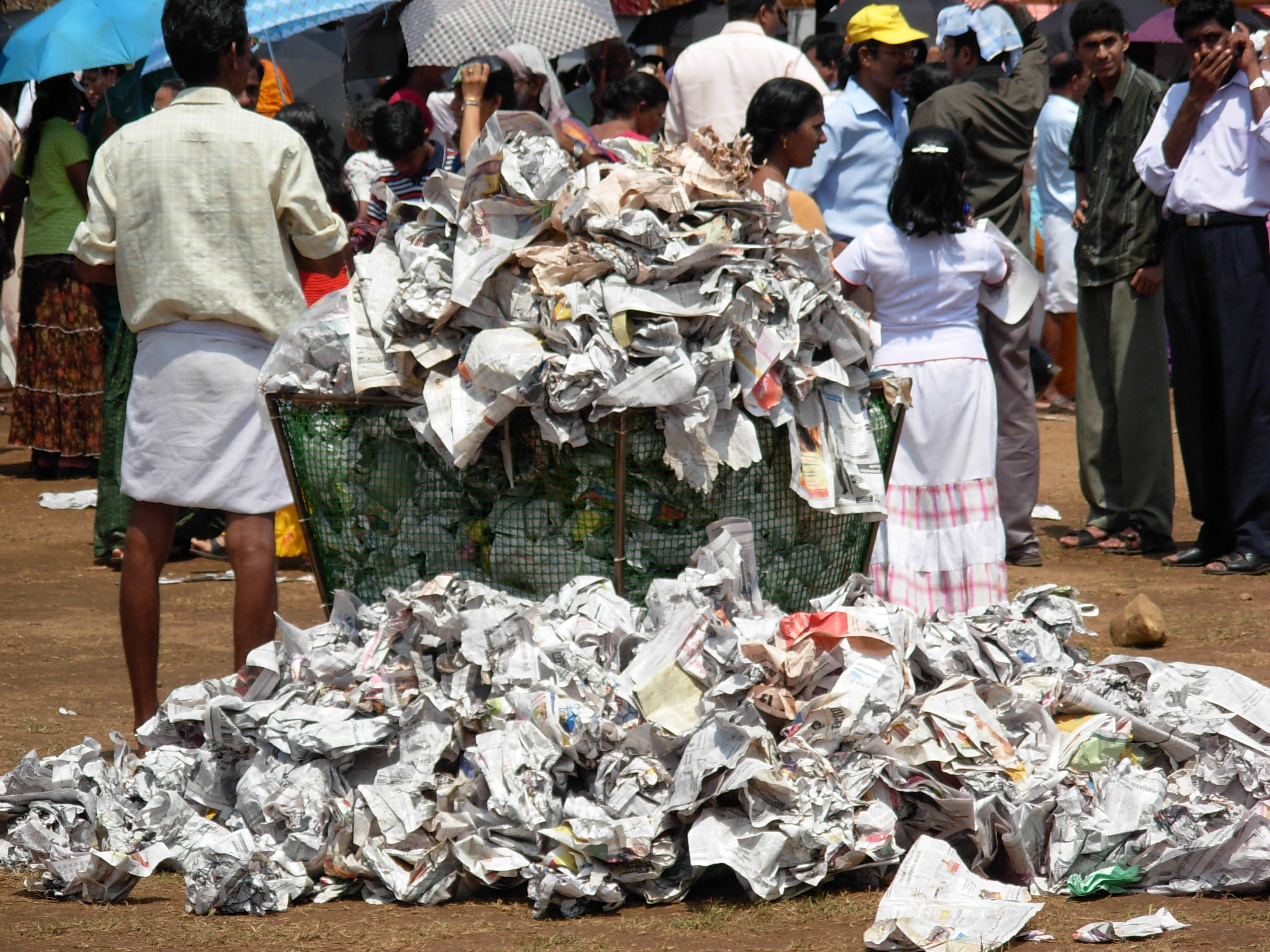 പരിസ്തിതി സൗഹ്രുത മാരാമൺ. ചവറുകൾ നീക്കംചെയ്യുന്നതിനുള്ള സംവിധാനം